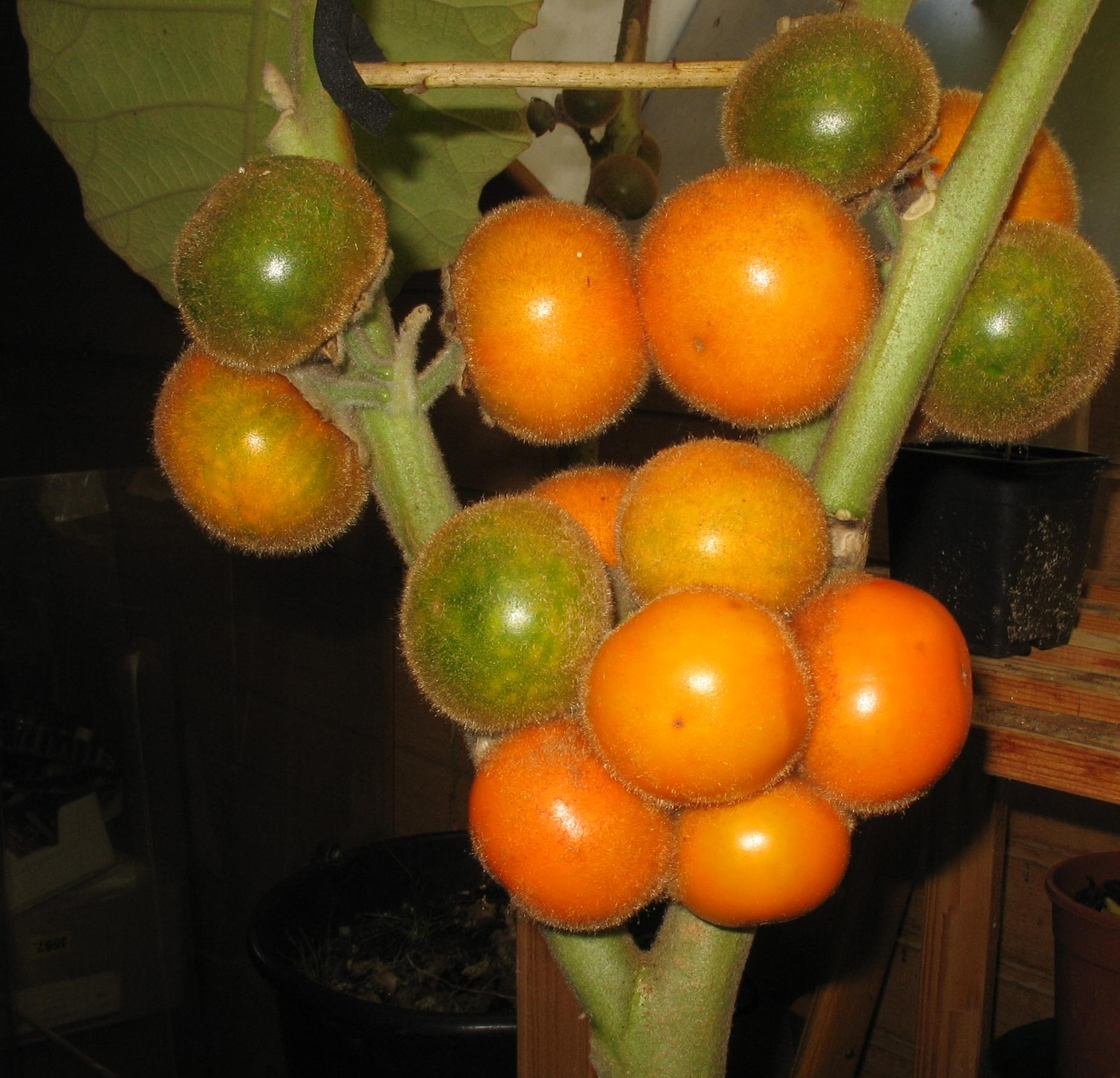 Solanum quitoense fruit